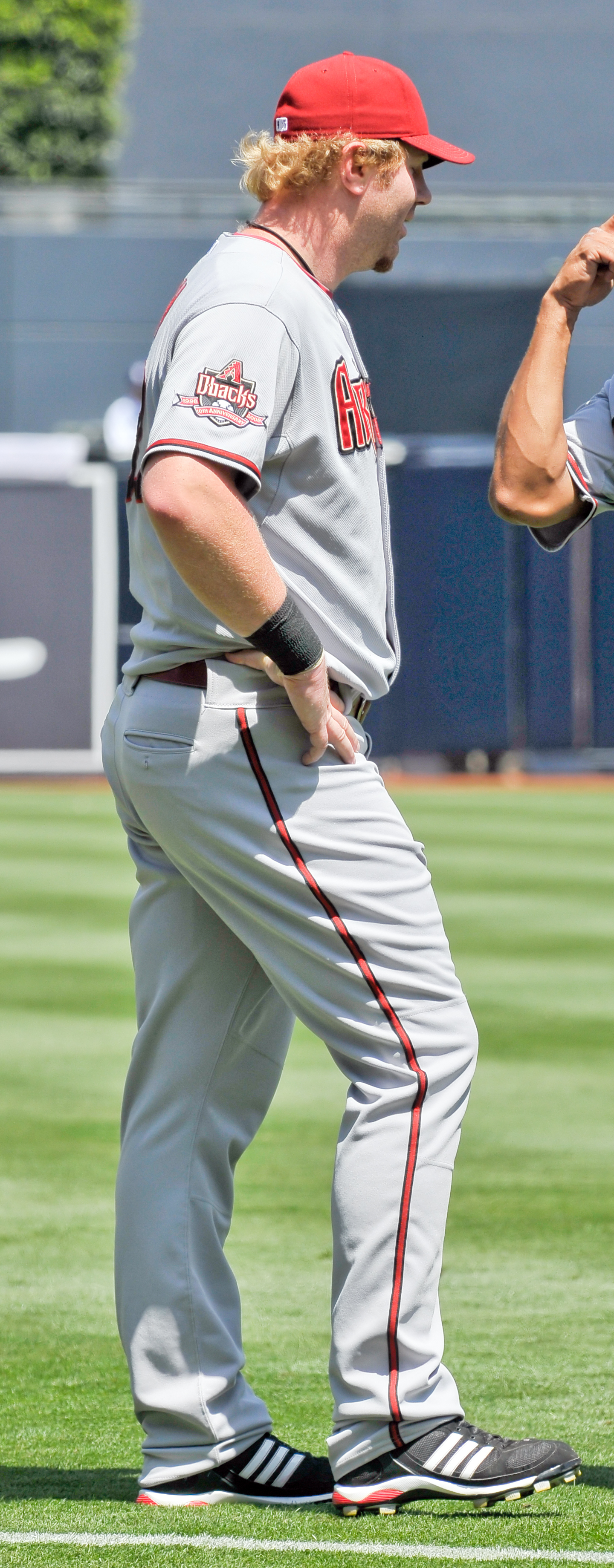 Adam Dunn